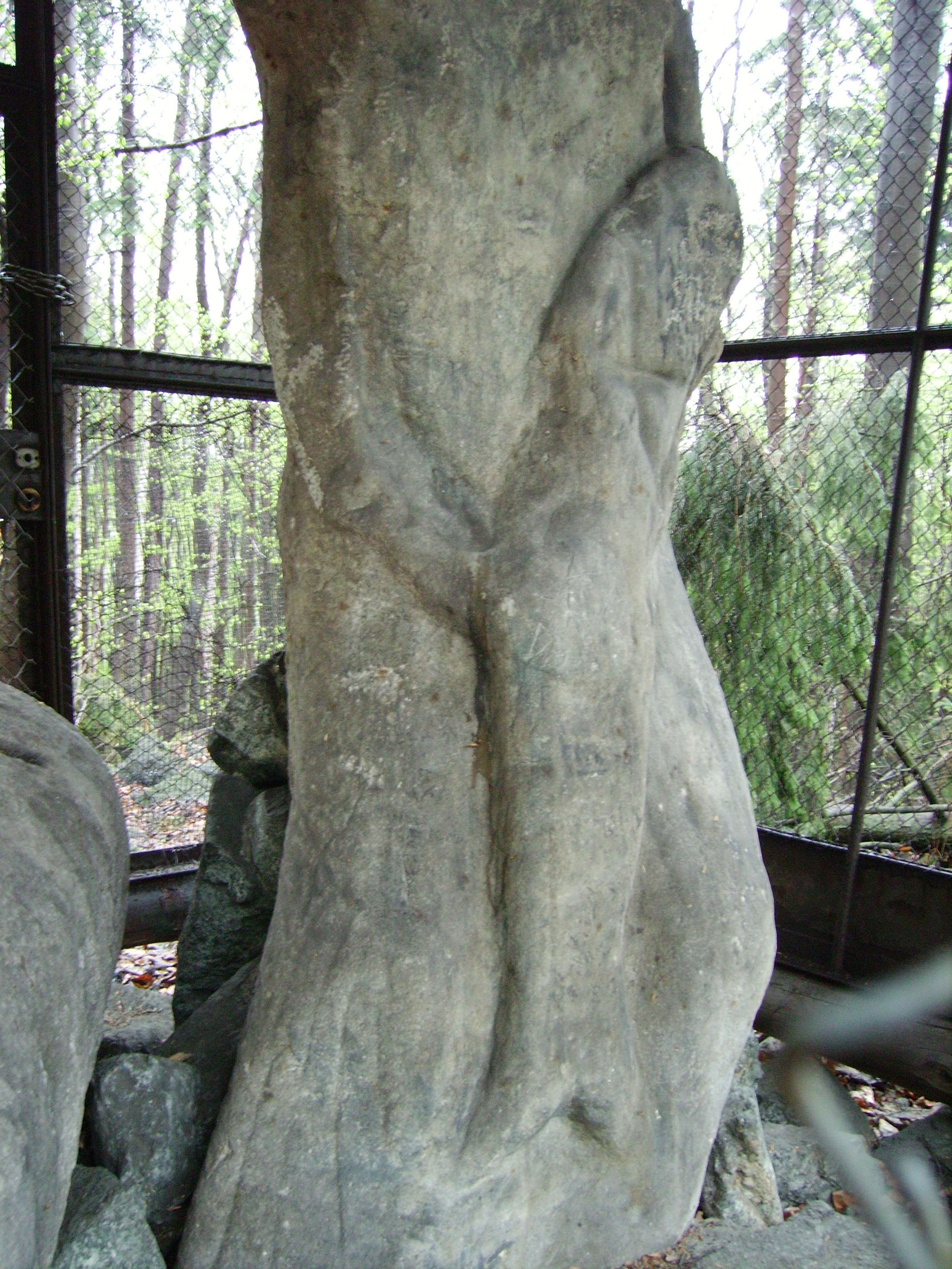 Ślęża - Panna z rybą (fragment)